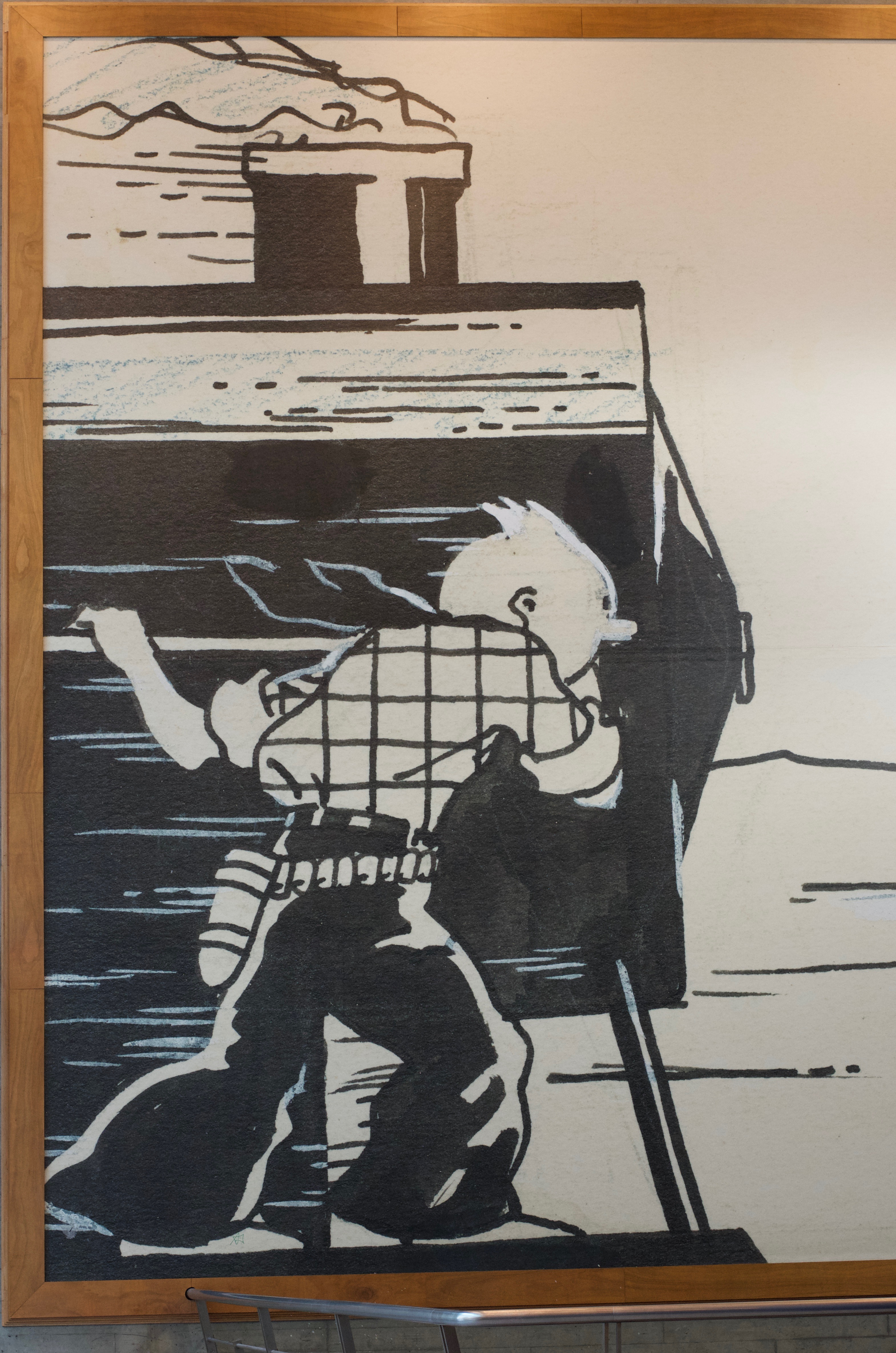 Fresque de Tintin voyageant en train, à la gare de Bruxelles midi. Elle a été inaugurée le 10 janvier 2007, à l’occasion du 100ème anniversaire de la naissance d’Hergé et des 78 ans de Tintin. La fresque fait 64 m² , elle est est une case agrandie de l’album noir et blanc de « Tintin en Amérique » de 1932.